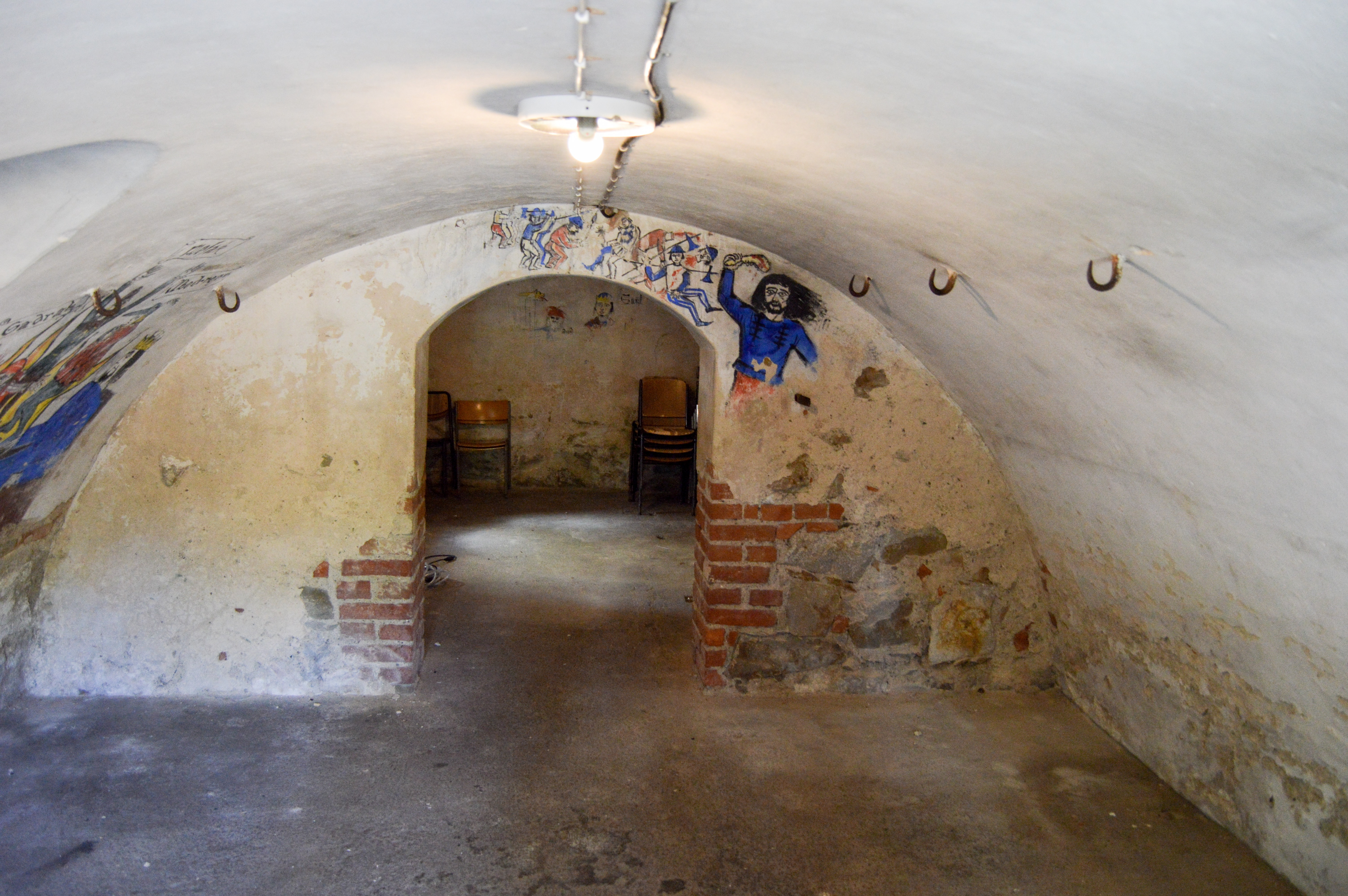 Källaren i Thomanders studenthem, Lund.